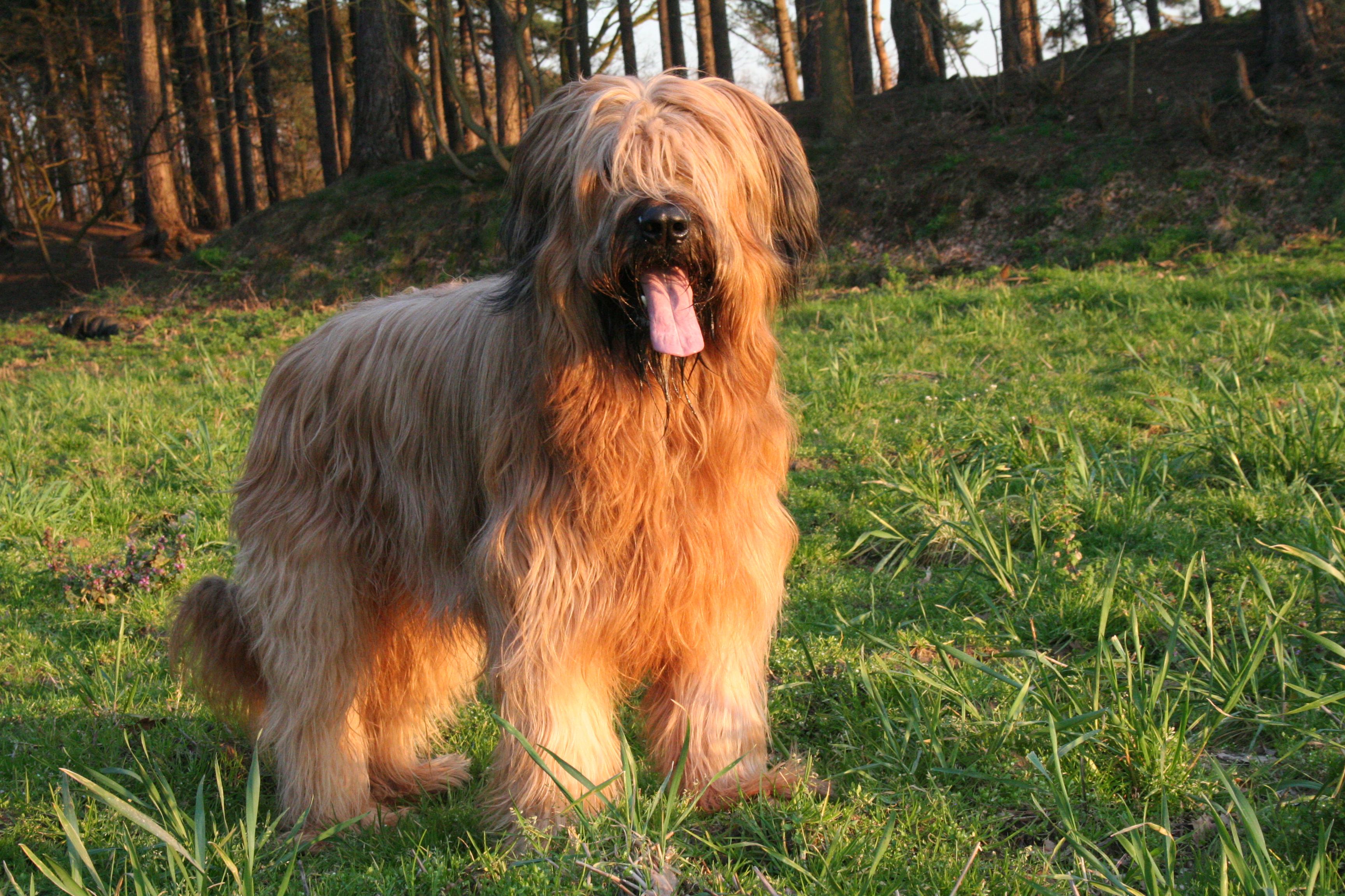 Briard op de ouderdom van 2 jaar